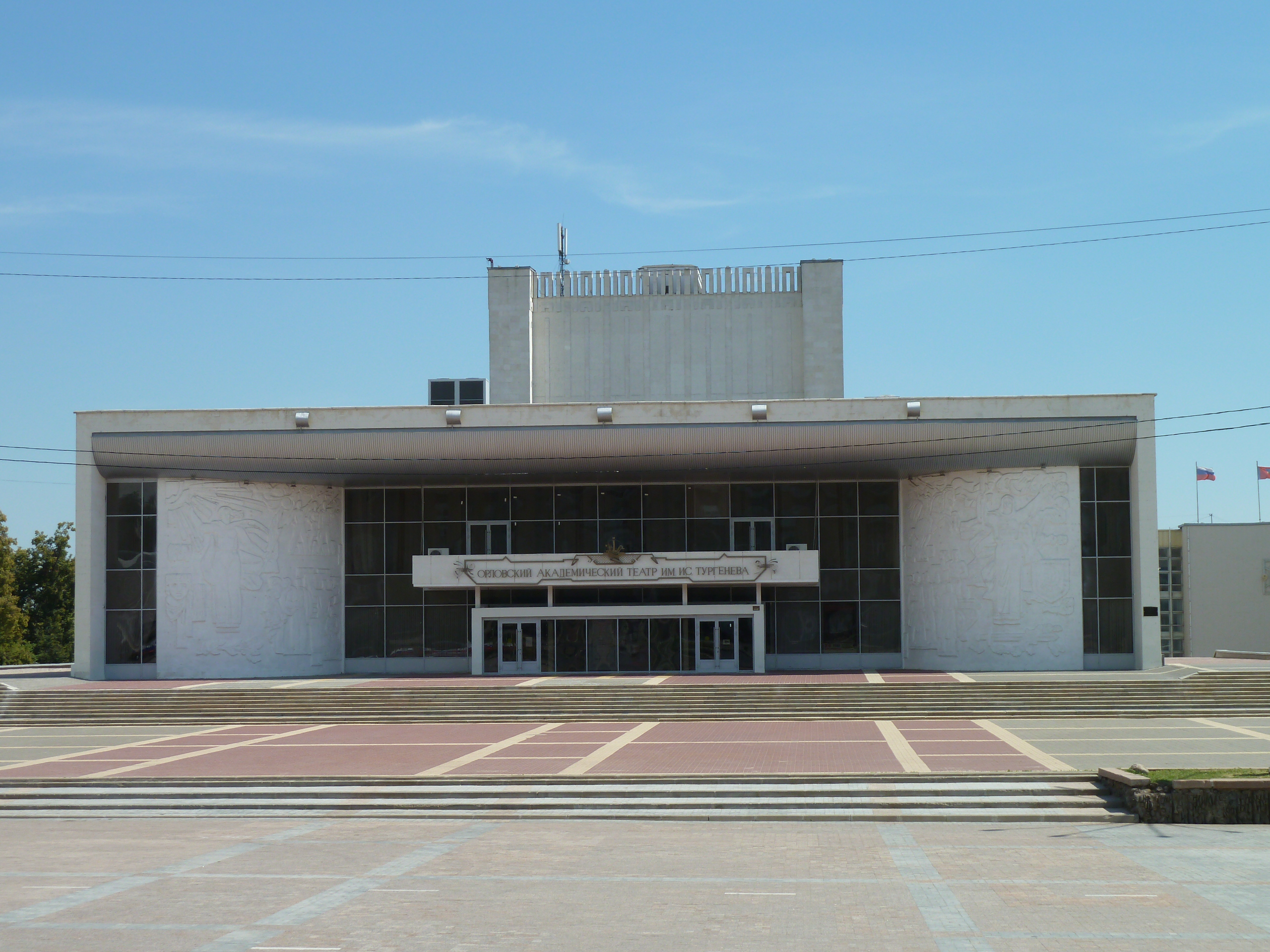 Драматический театр в городе Орле